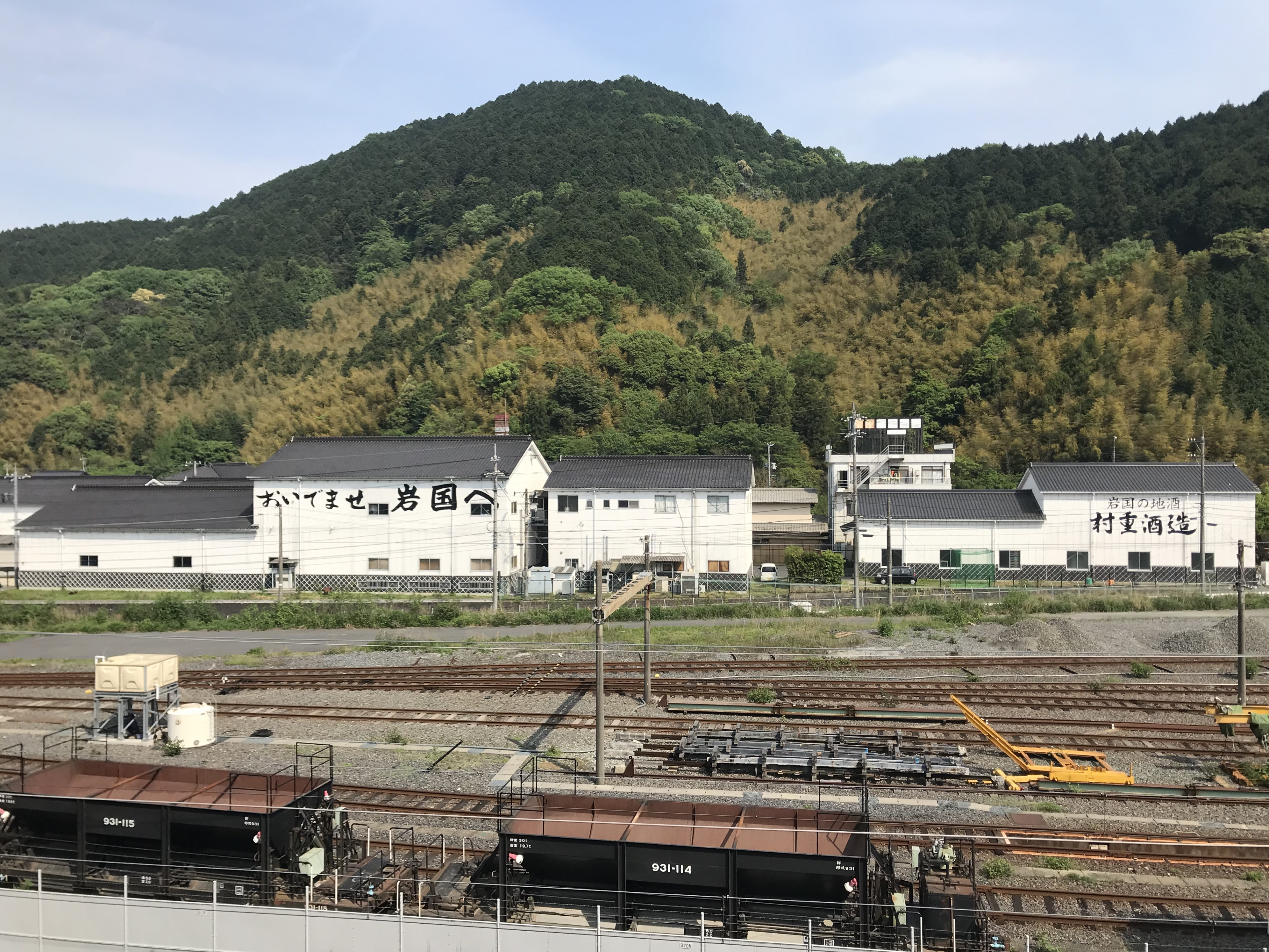 新岩国駅のホームより望む駅東側の景色